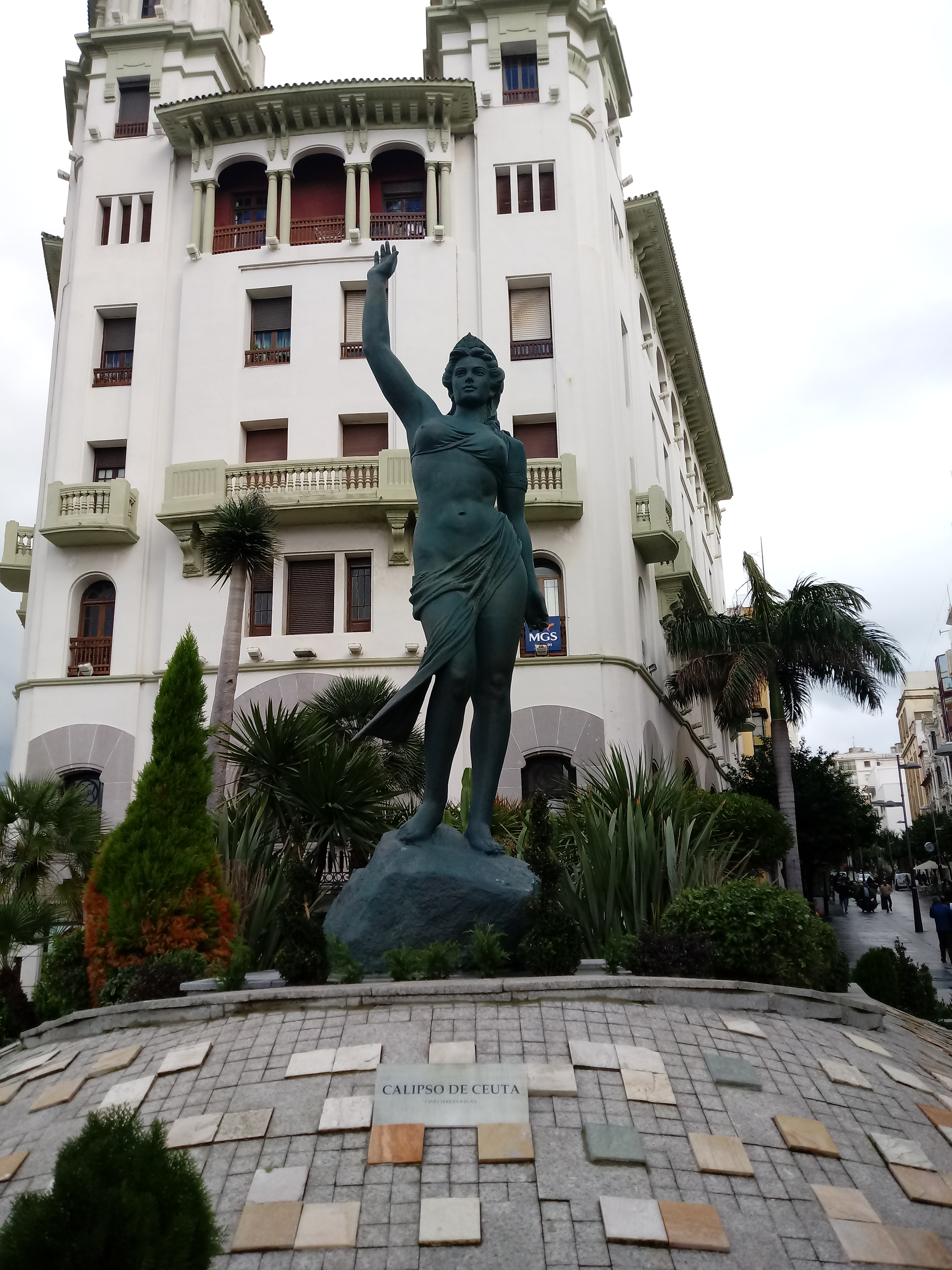 Estatua de la mitologia griega en Ceuta ( Odisea)